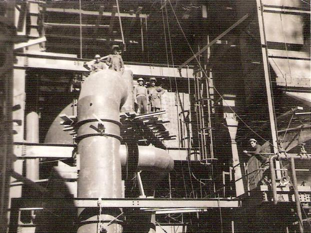 Un grupo de trabajadores durante la construcción de la central térmica de Velilla del Río Carrión (España).